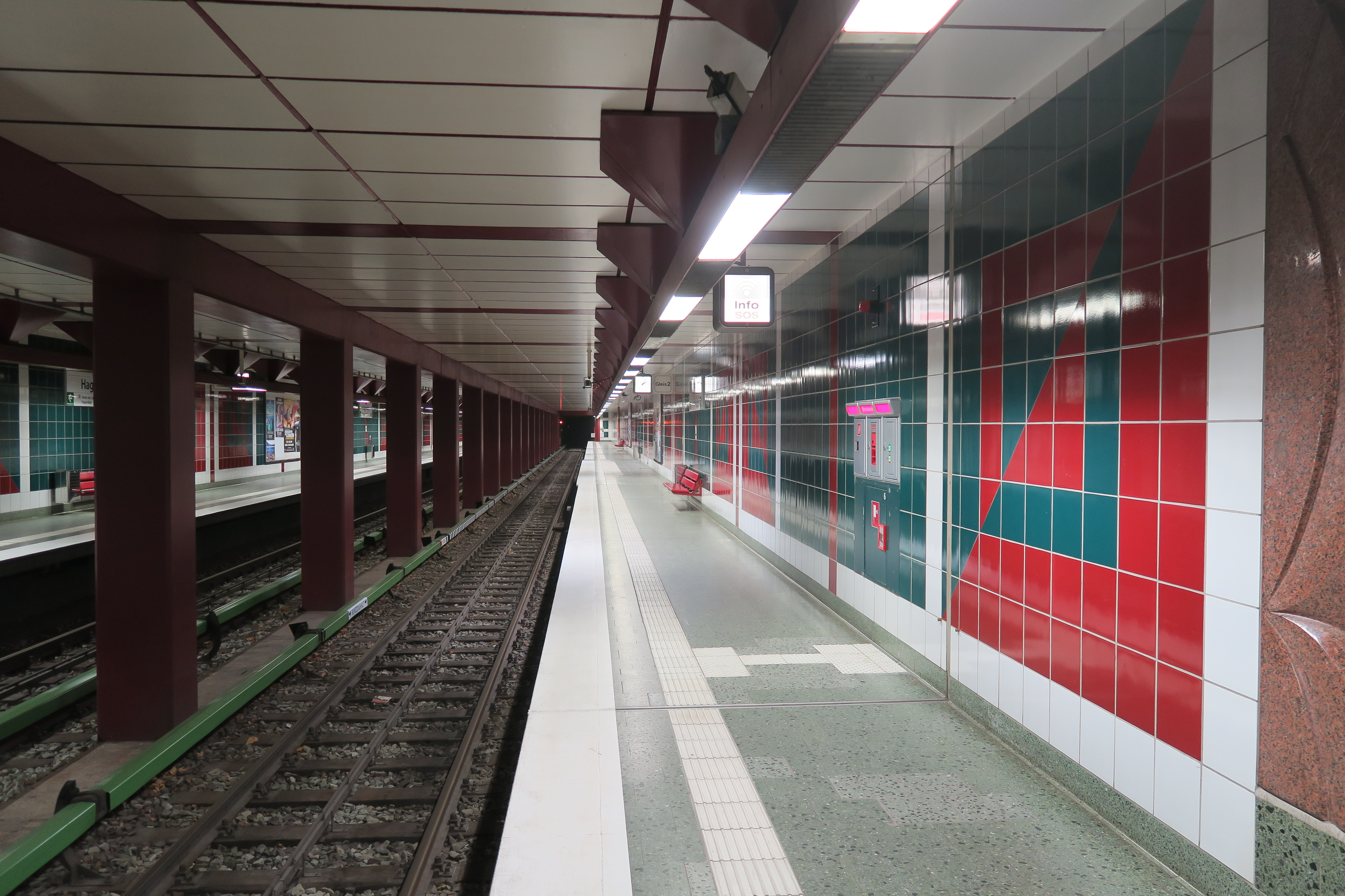 U-Bahnhof Hagendeel 2019 in Hamburg